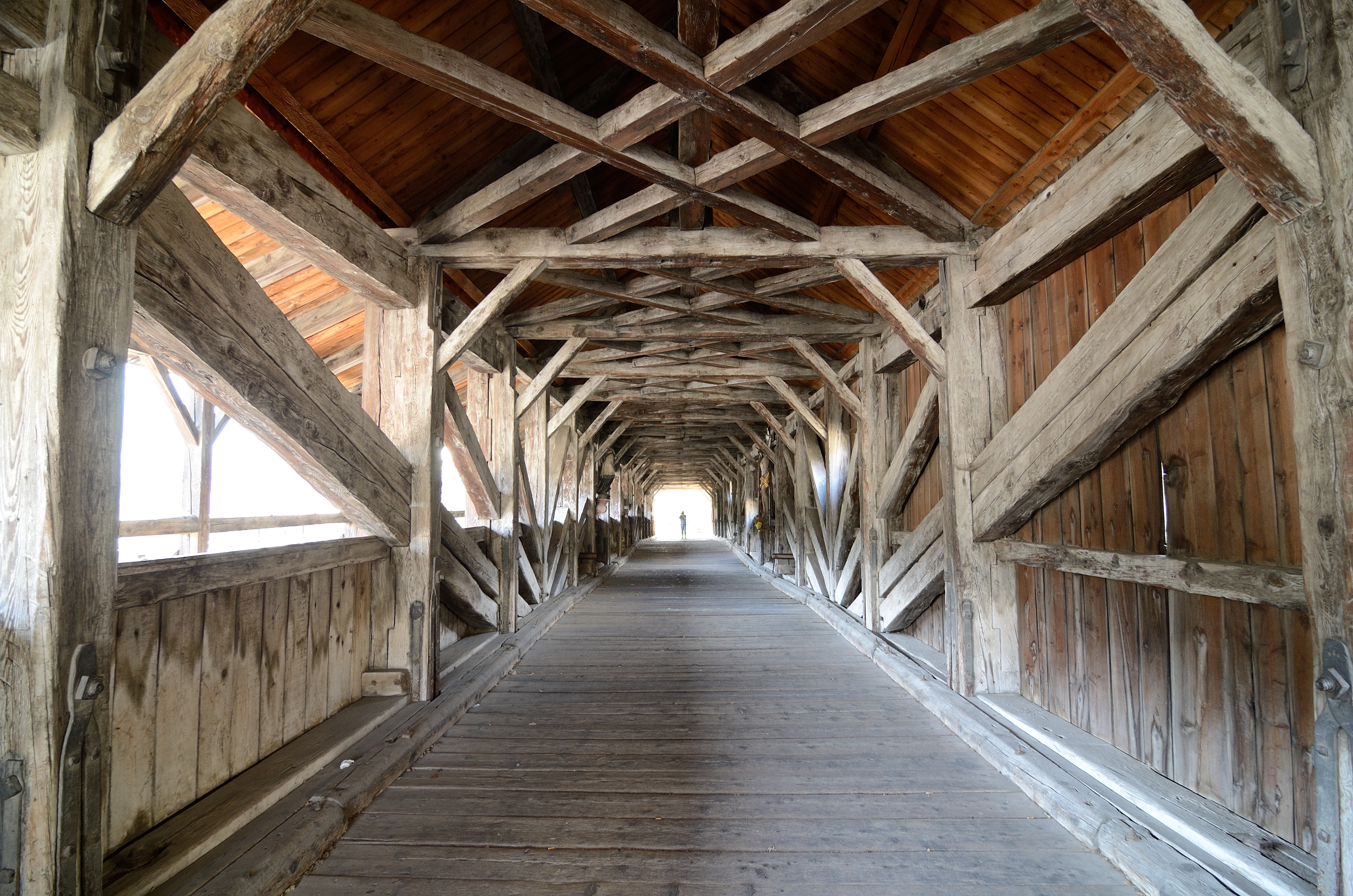 Straßenbrücke Punbrugge